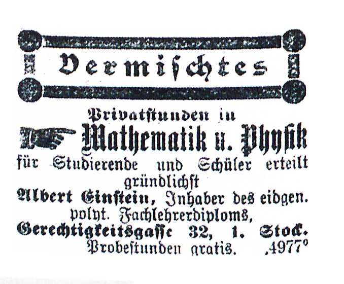 Text:Privatstunden in Mathematik u. Physik für Studierende und Schüler erteilt gründlichst Albert Einstein, Inhaber des eidgen. polyt. Fachlehrerdiploms, Gerechtigkeitsgasse 32, 1. Stock, Probestunden gratis